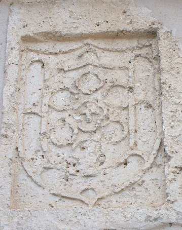 Escudo de armas de Gómez González, en la fachada del Estudio de Gramática de Cuéllar, una de sus fundaciones.